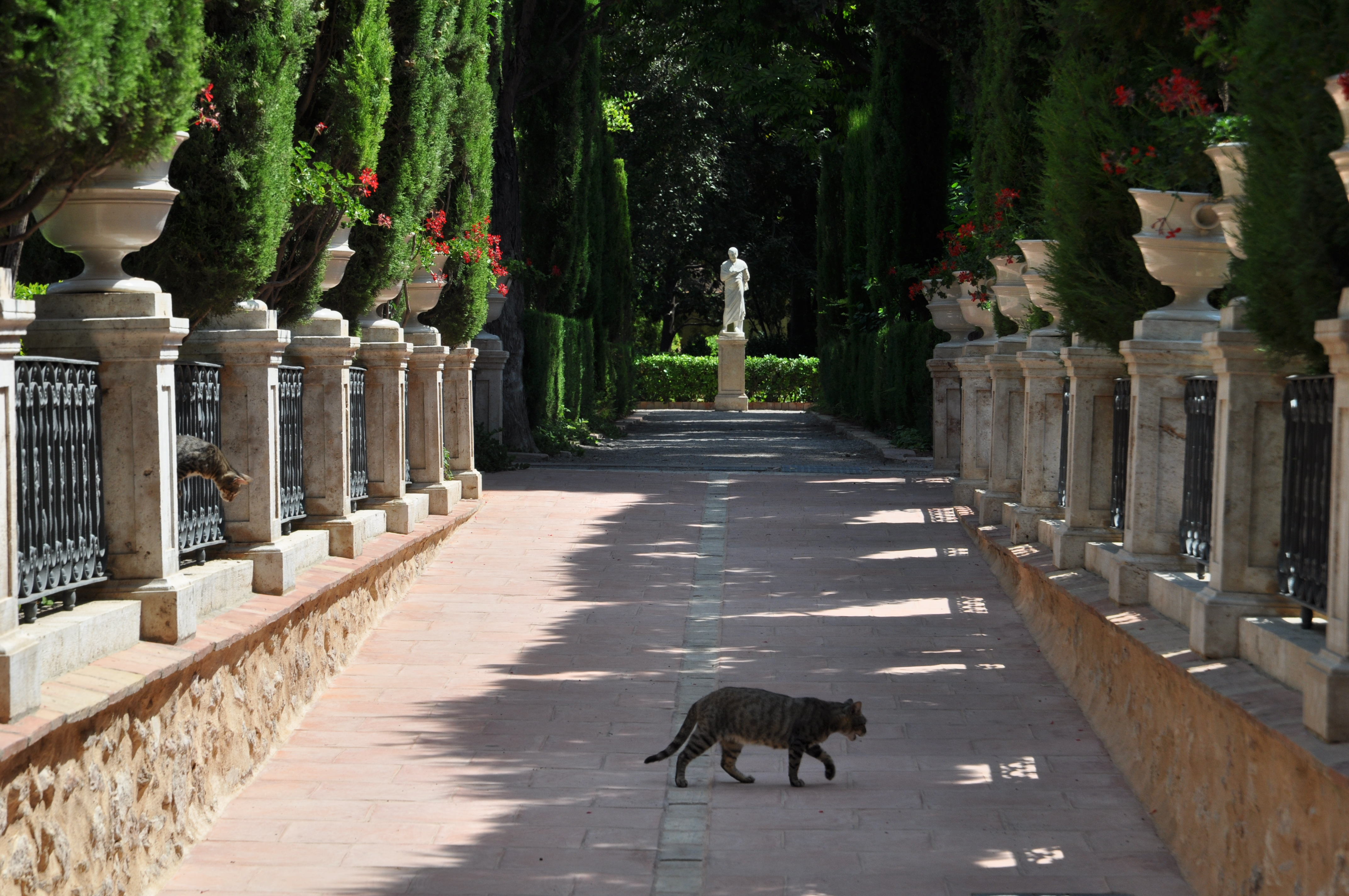 Jardín de Monforte de Valencia.